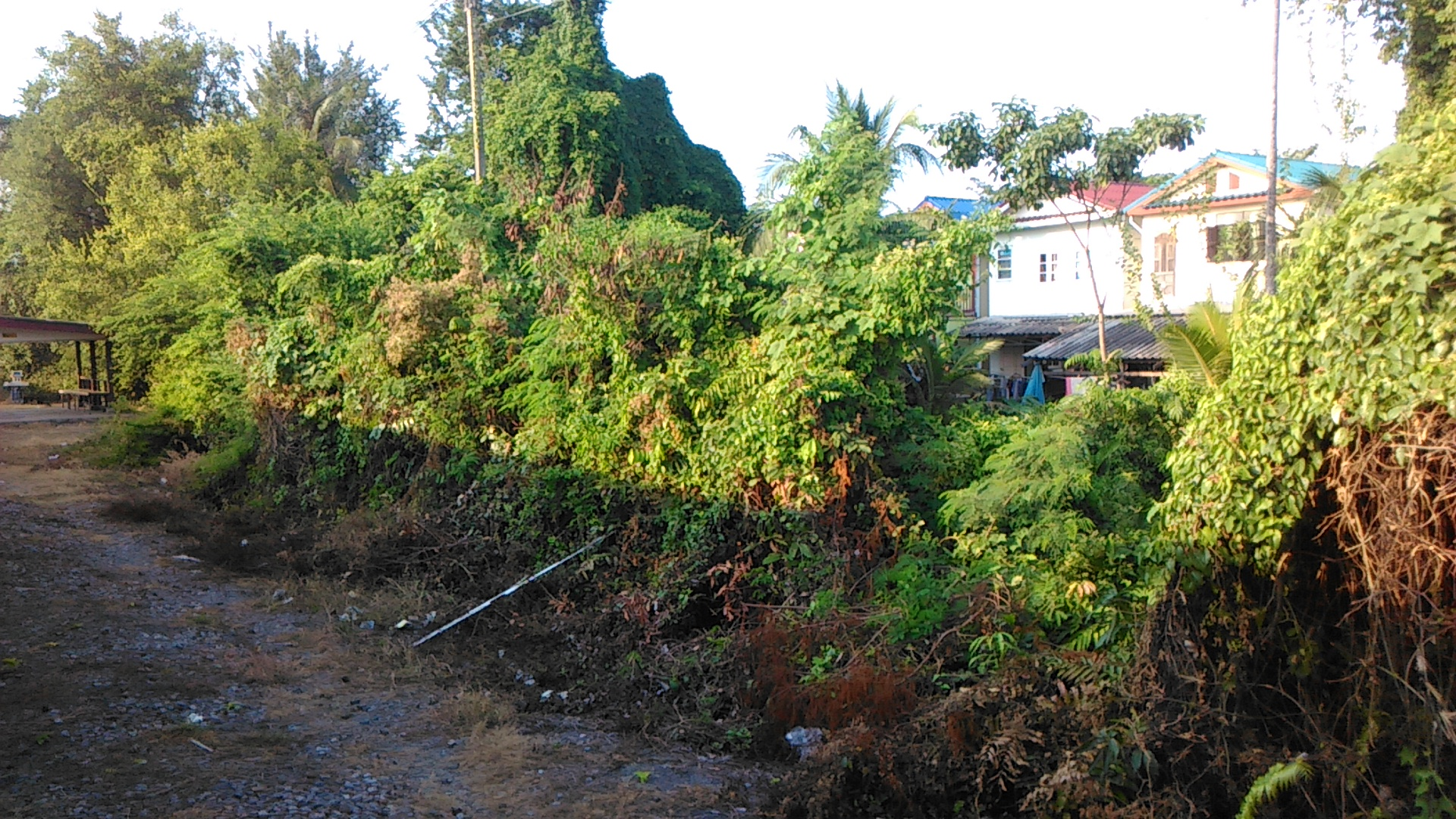 Железнодорожная платформа Банграмад